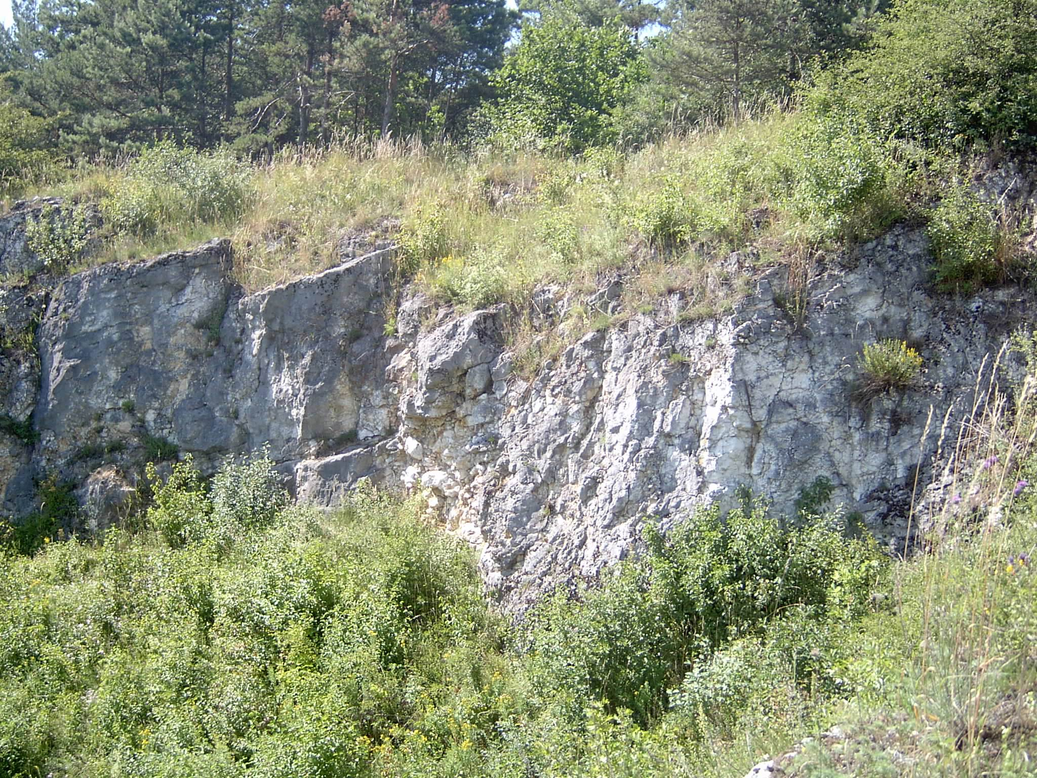 Odsłonięcia górnojurajskich wapieni